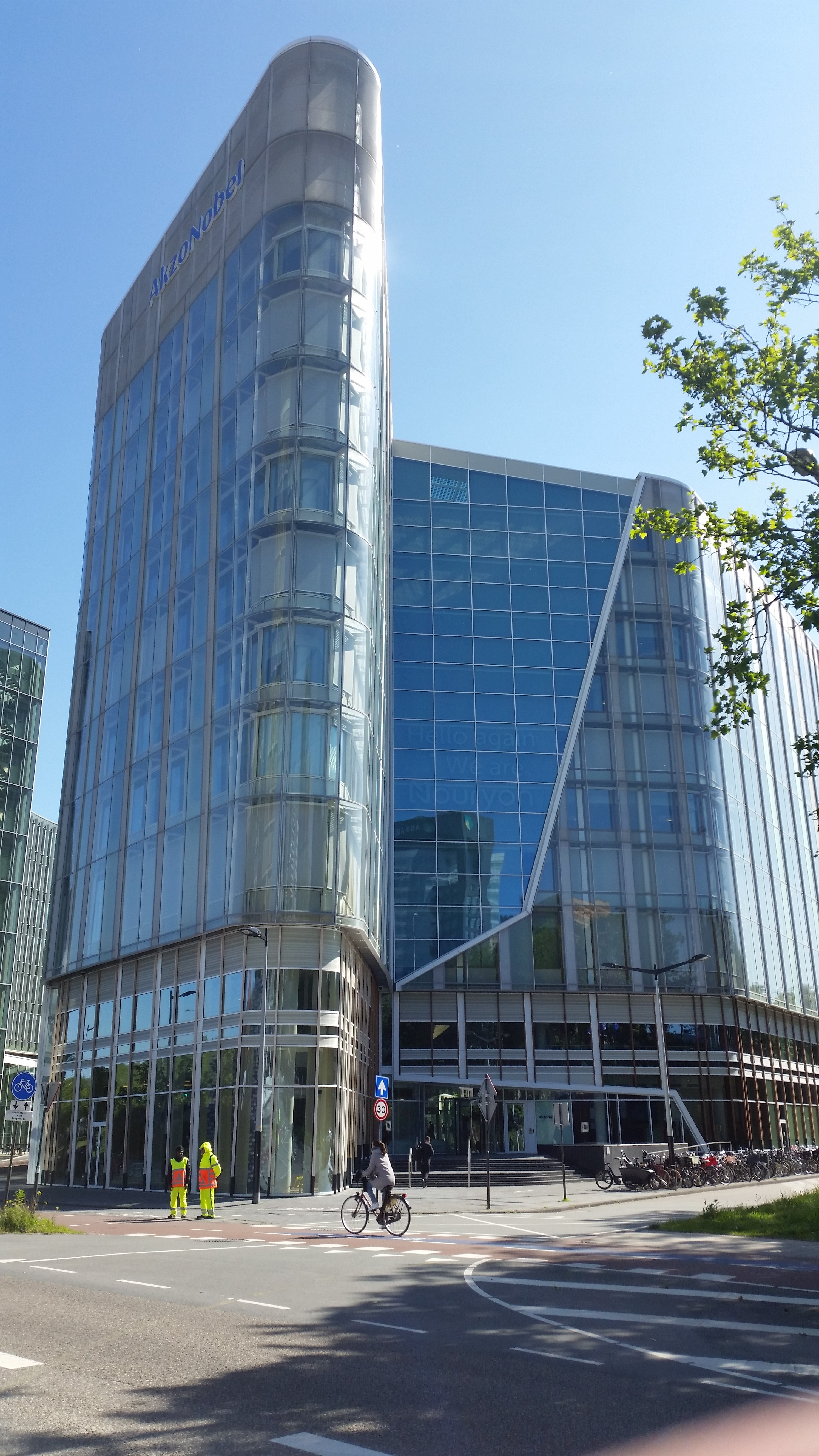 AkzoNobel Headquarters